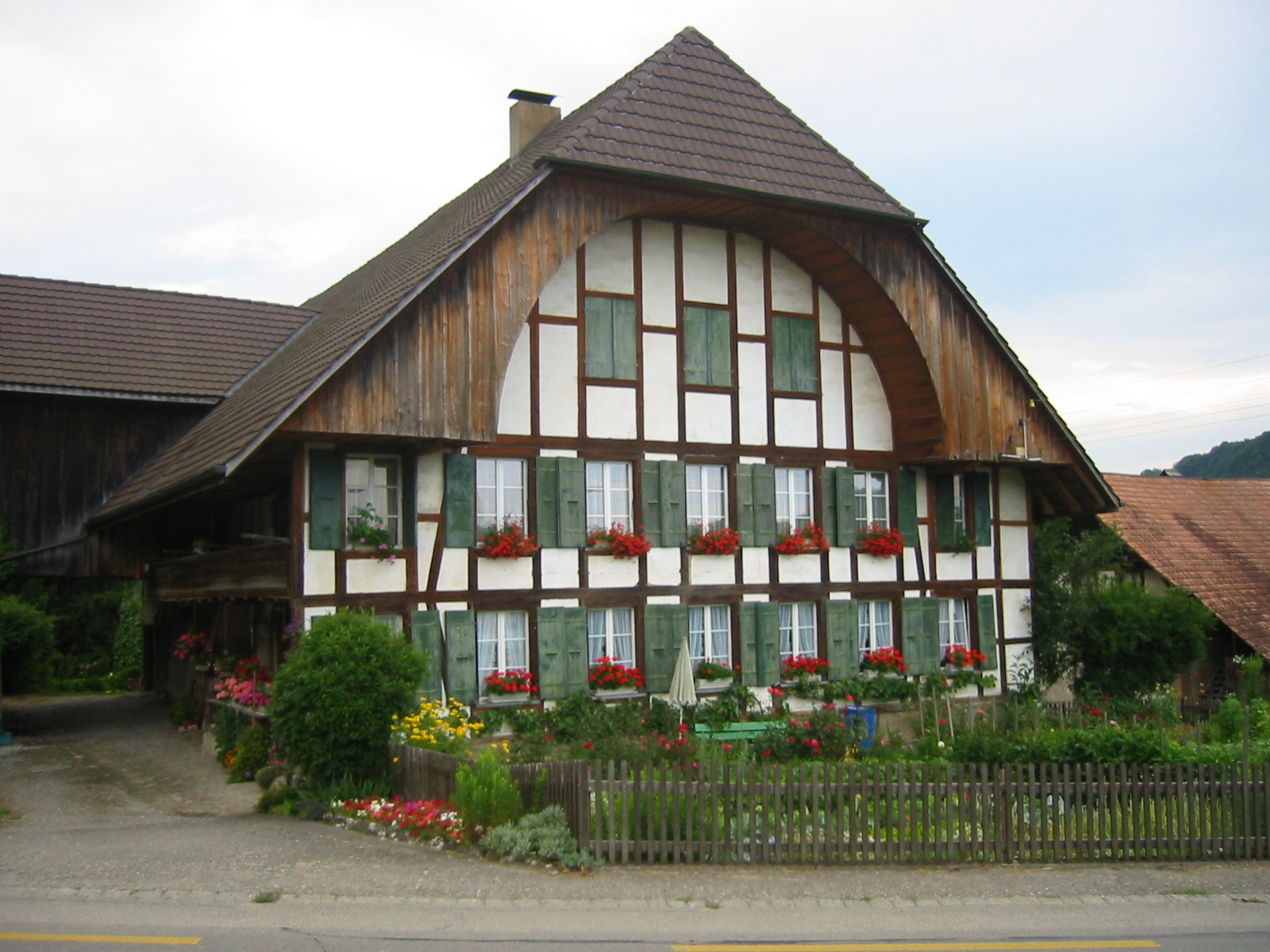 Farms in the canton of Bern